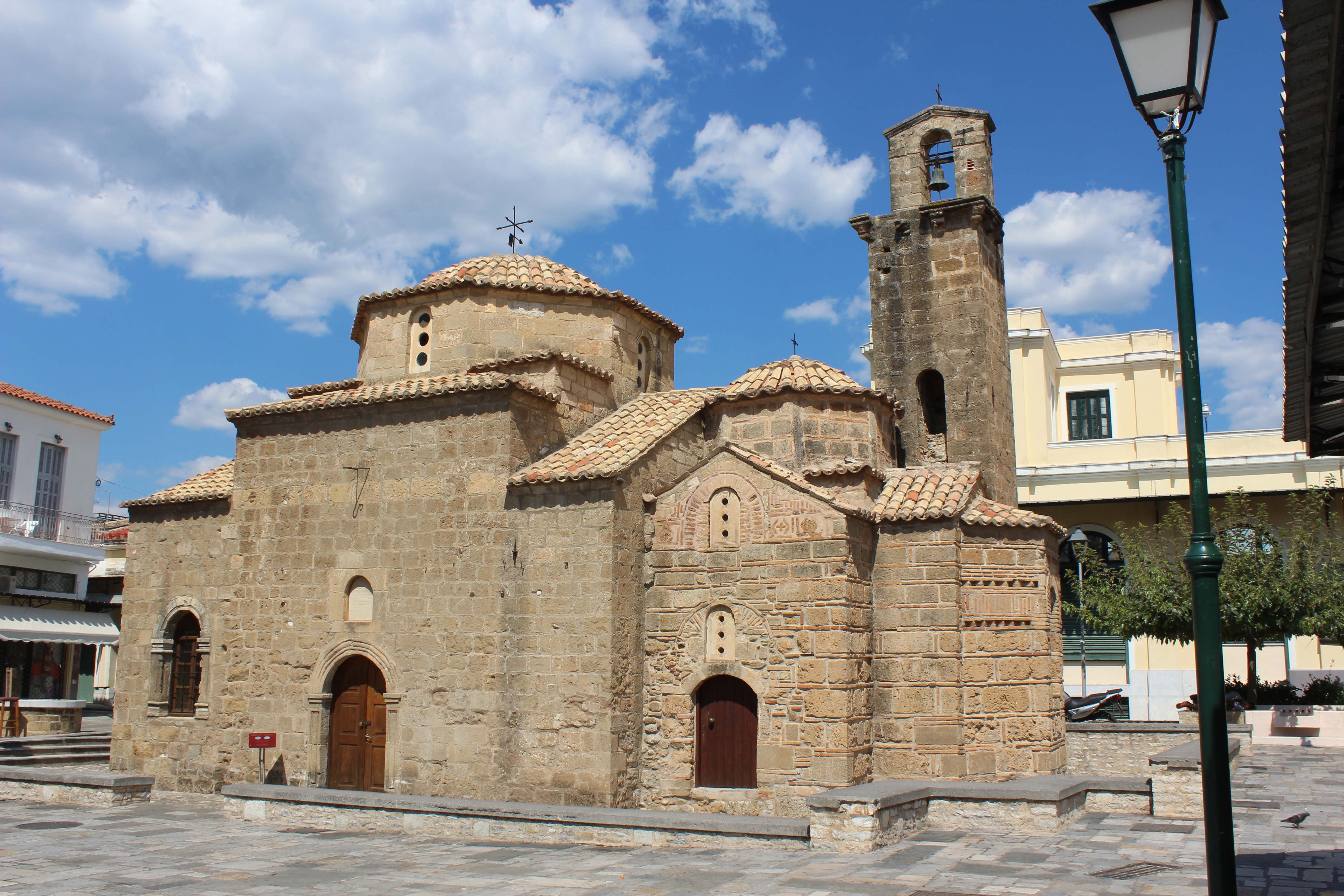 Ναός Αγίων Αποστόλων Καλαμάτας«Ναός Αγίων Αποστόλων Καλαμάτας»